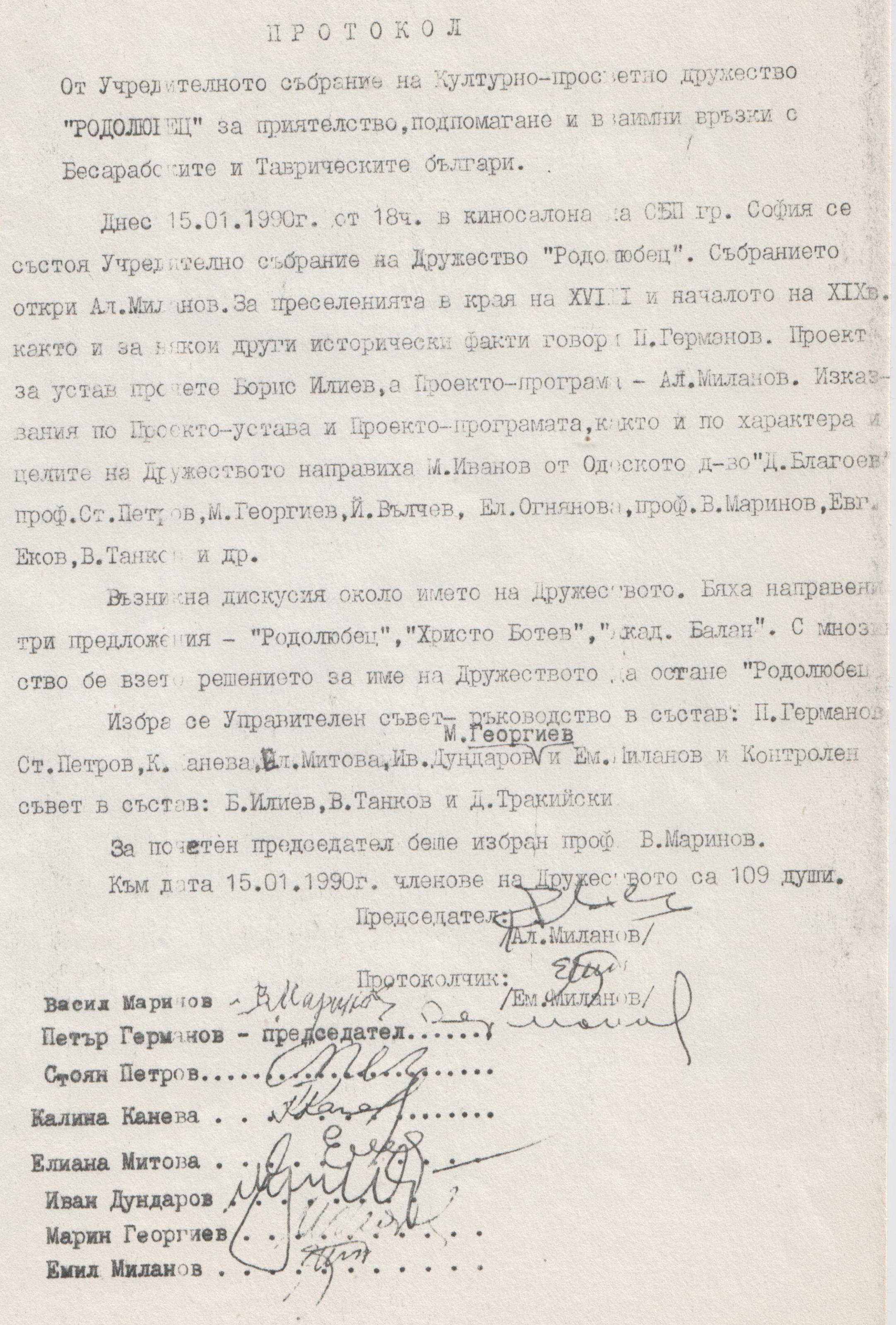 Протокол от Учредителното събрание на Културно-просветното дружество за връзки с бесарабските и таврийските българи "Родолюбец".